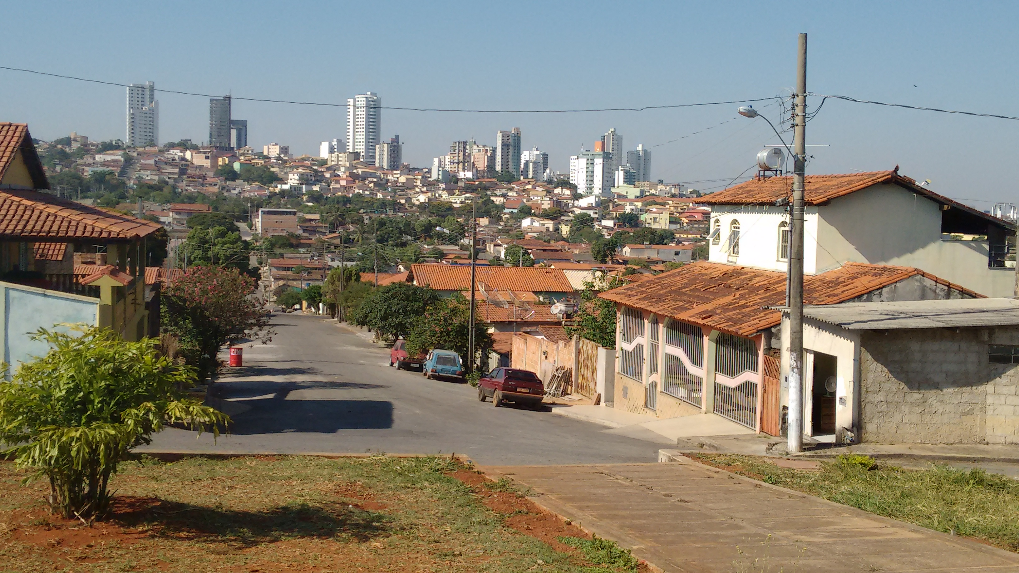 Vista Parcial dos Bairros Vila Gontijo e Centro